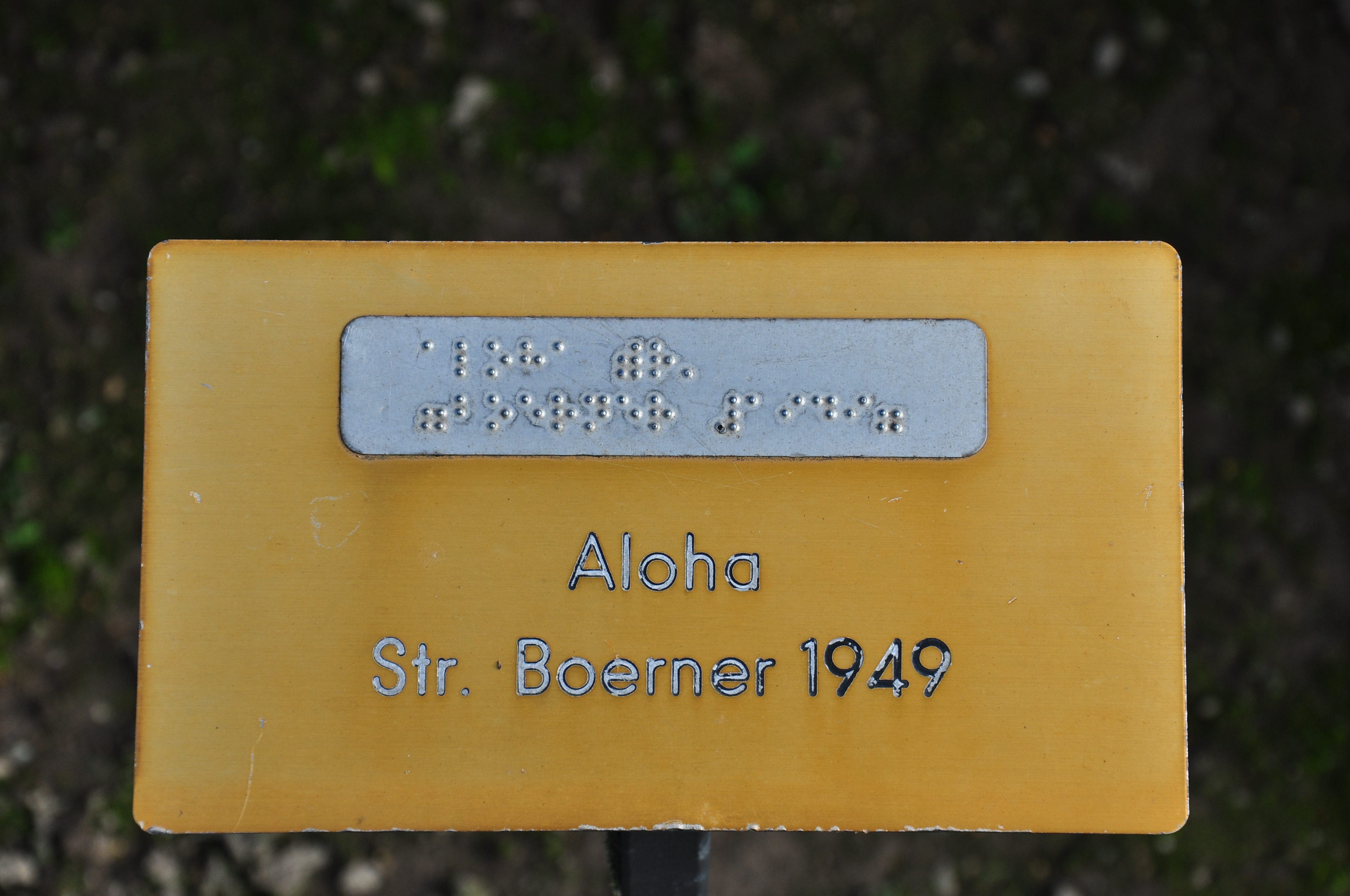 Aloha (Str. Boerner 1949), Duftrosengarten in Rapperswil (Switzerland)